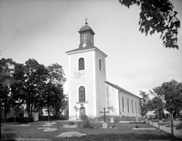 Huddunge kyrka, Huddunge socken, Uppland